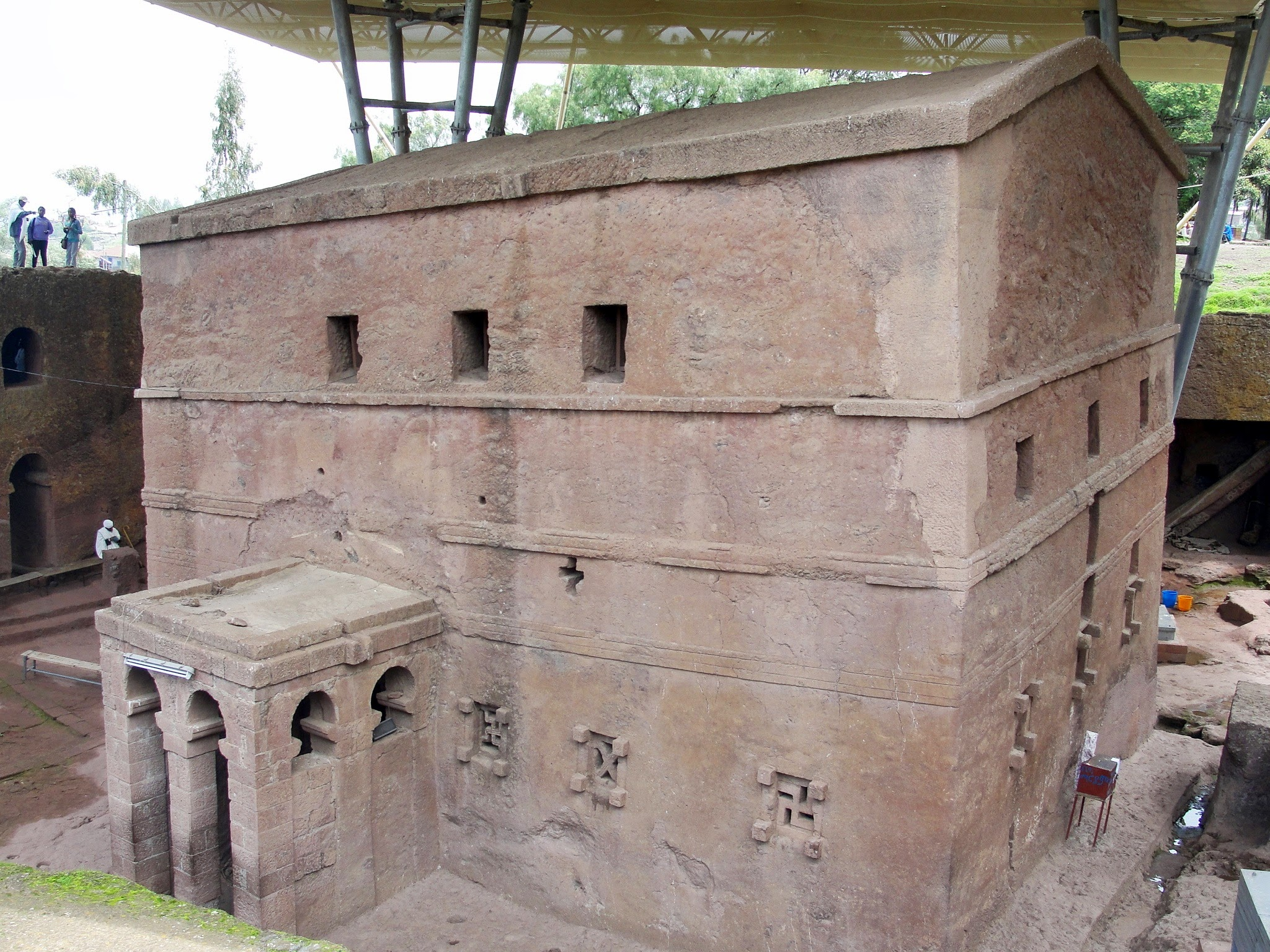 Bet Maryam, Lalibela, Ethiopia